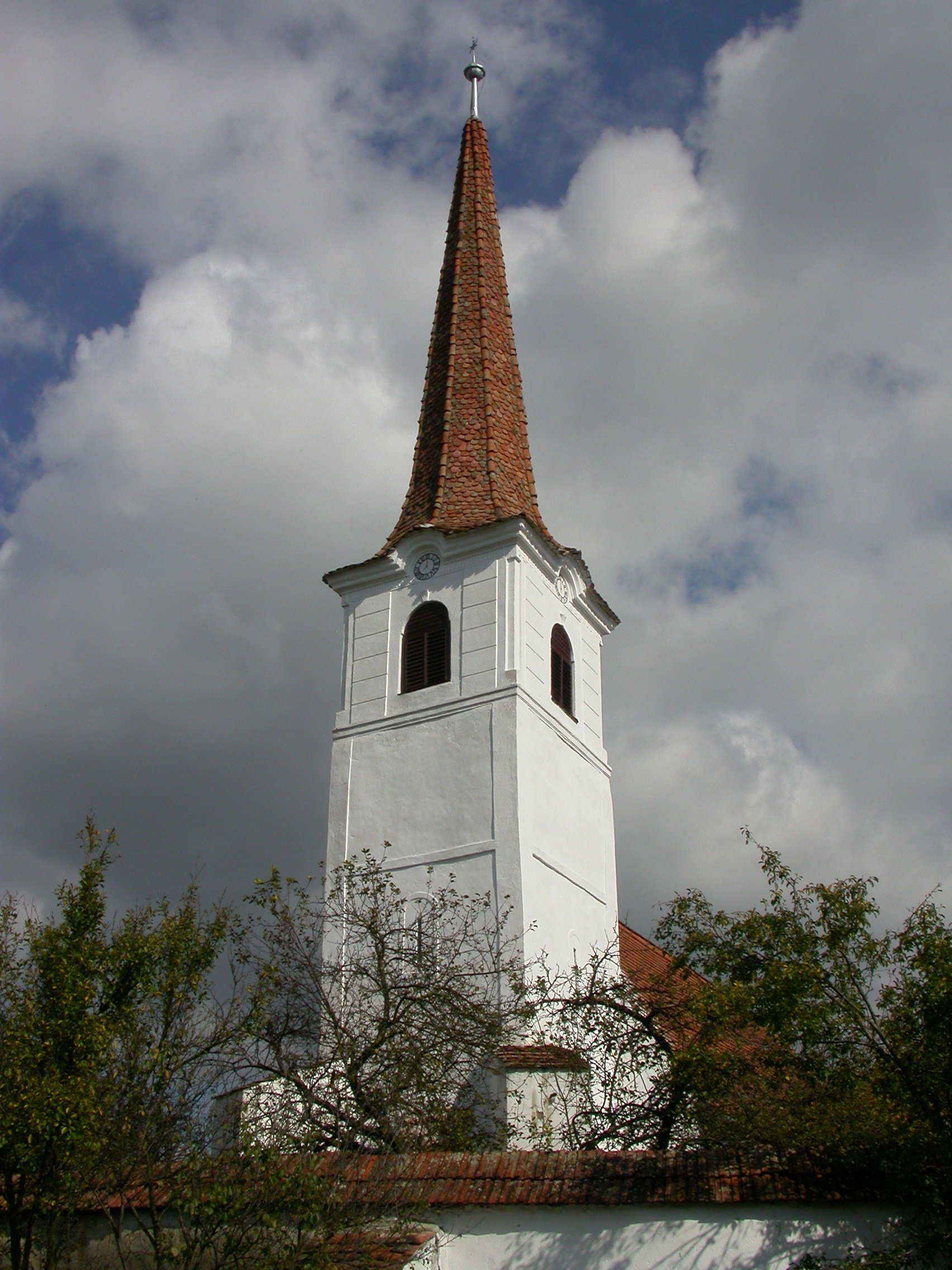 Ansamblul bisericii reformate, sec. XIII-XIX